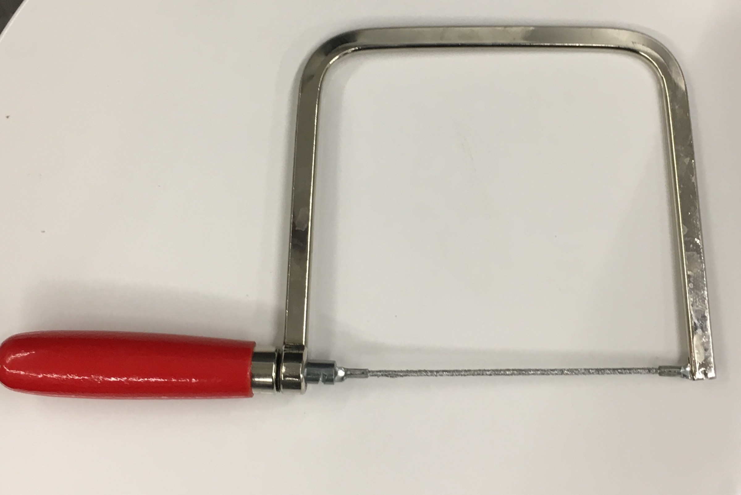 Fliesenbogensäge